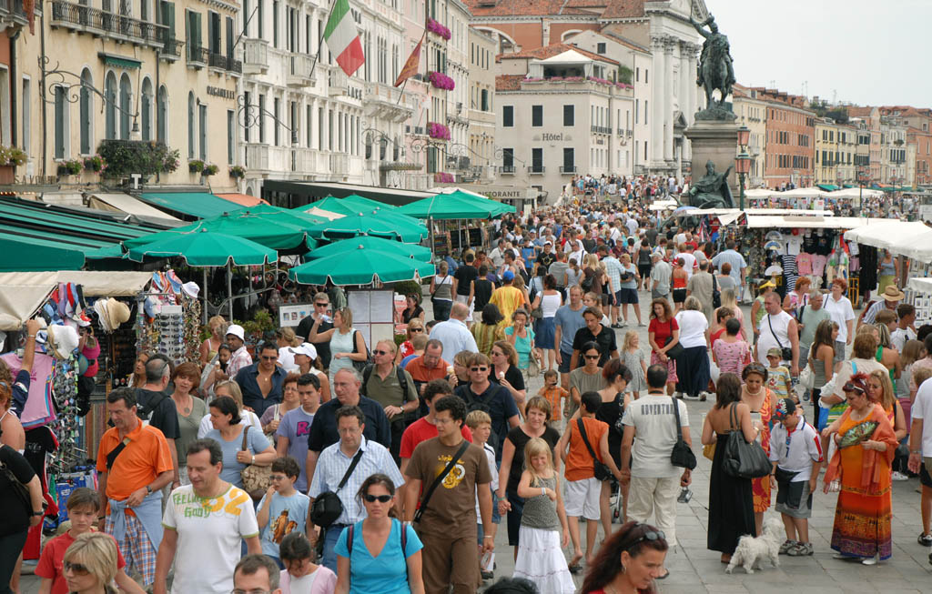 Images de Venise en août 2007